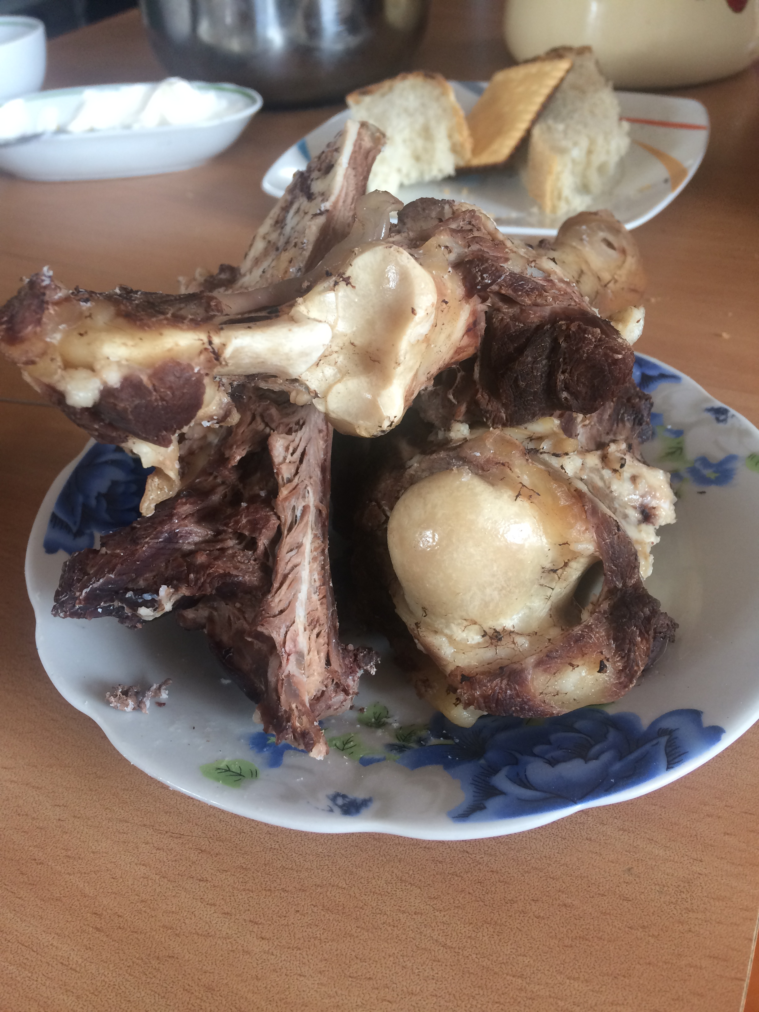 Мясо вареное